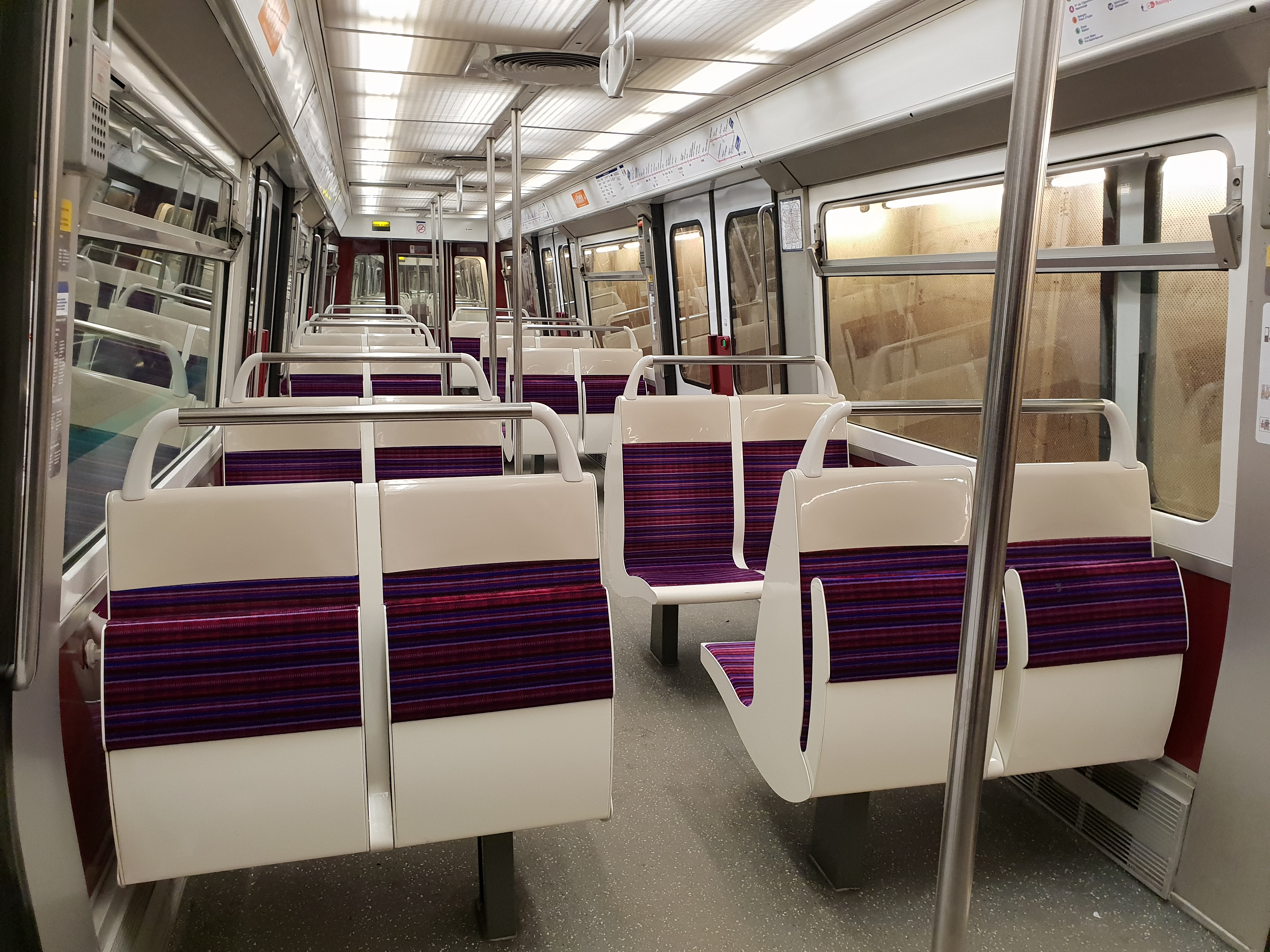 Rénovation intérieur des MF 77 de la ligne 7 du métro de Paris.